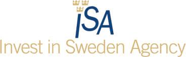 Logotype för Invest in Sweden Agency